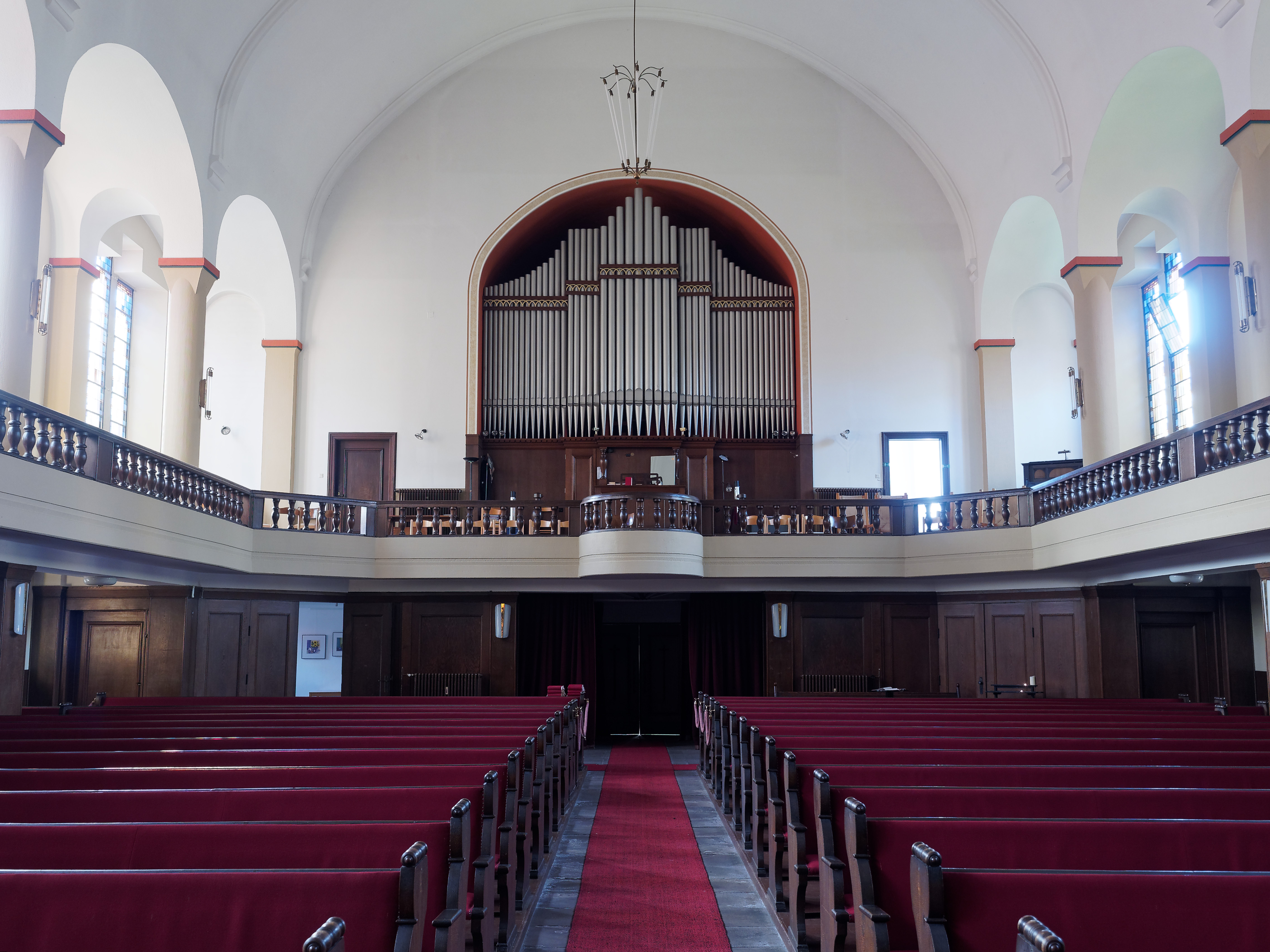 Die Orgel von 1928 in der Erlöserkirche in Bochum, Stadtteil Hiltrop. Erbauer der Orgel war der Orgelbaumeister Paul Faust aus Schwelm. Die Kirche ist denkmalgeschützt.